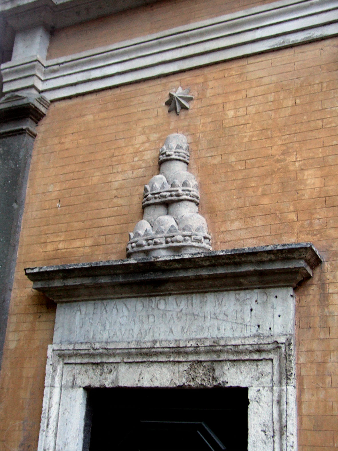 San Giovanni in Oleo, Oratorio a Roma, stemma di Alessandro VII